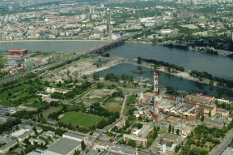 Lágymányosi bridge, Budapest, Hungary